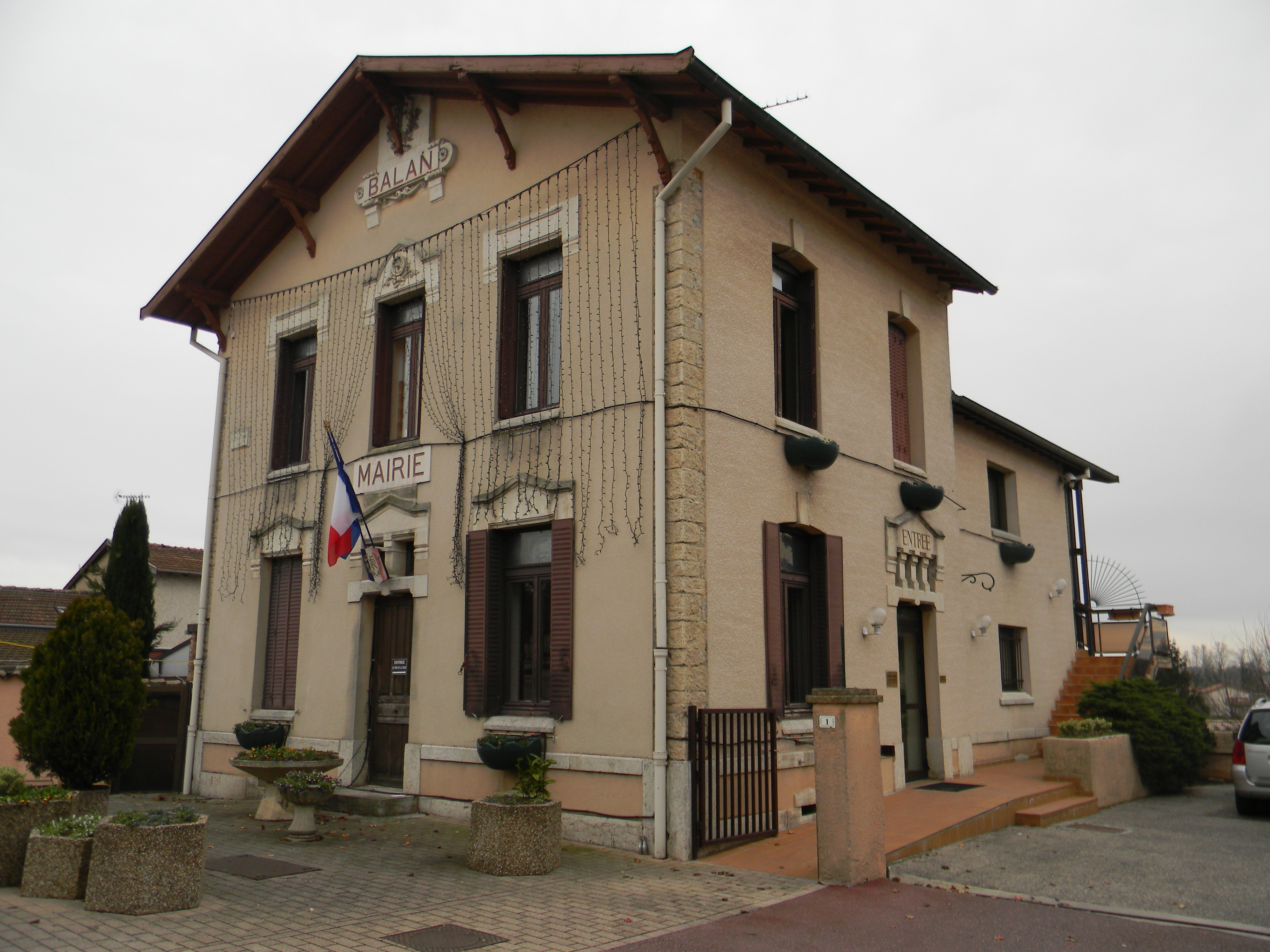 Mairie de Balan (Ain) datant de 1889.